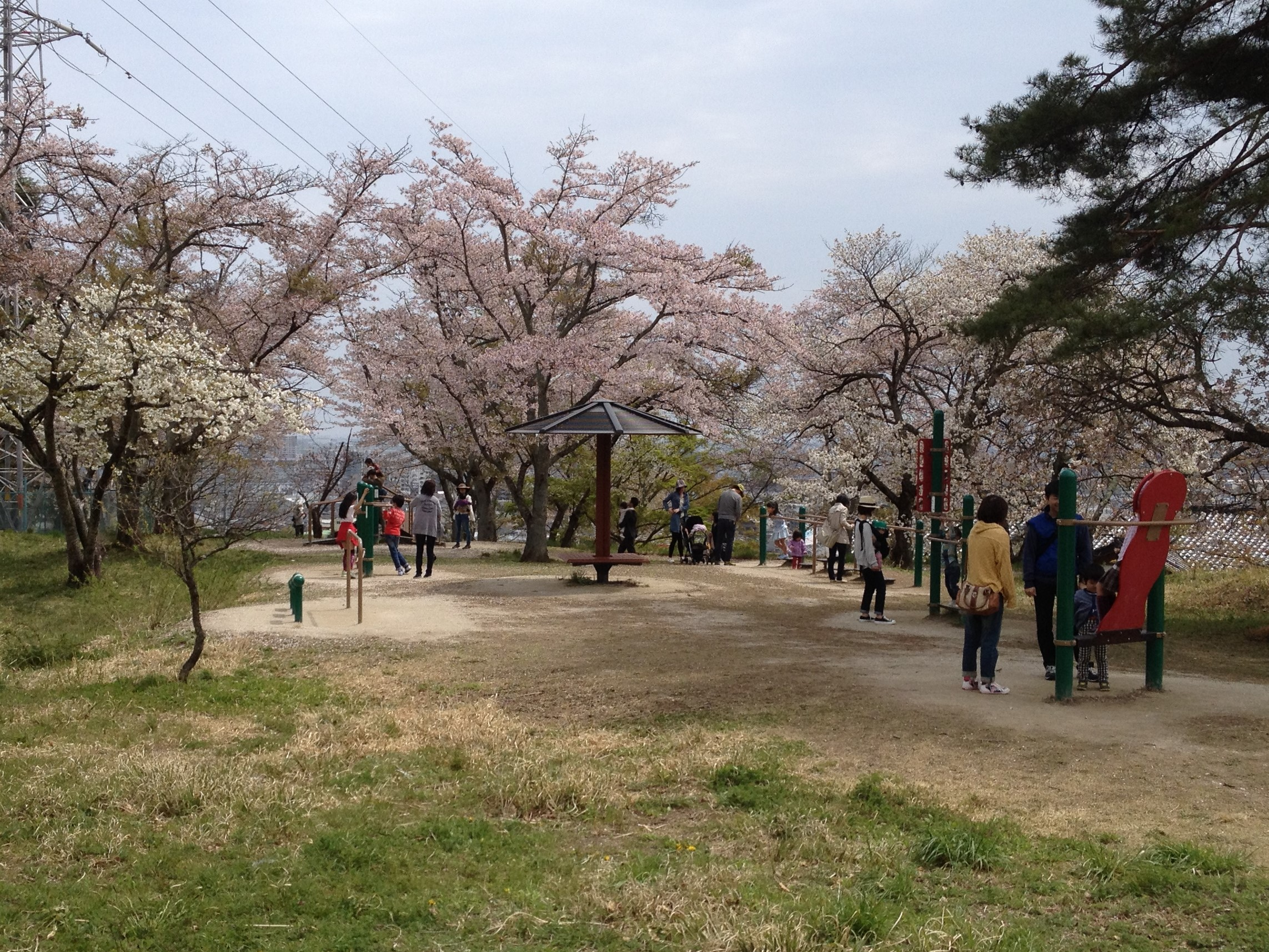 三神峯公園・健康遊具広場（2015年4月）